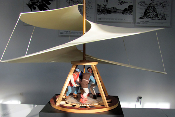 Helix von Leonardo da Vinci im Hubschraubermuseum Bückeburg